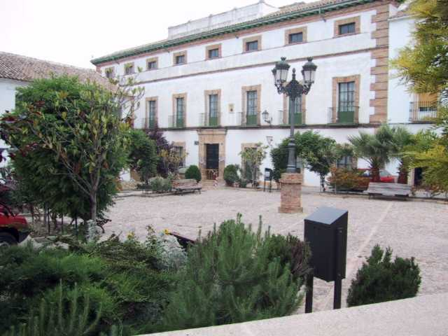 Plaza Serrano, en Arjona, Jaén, España.